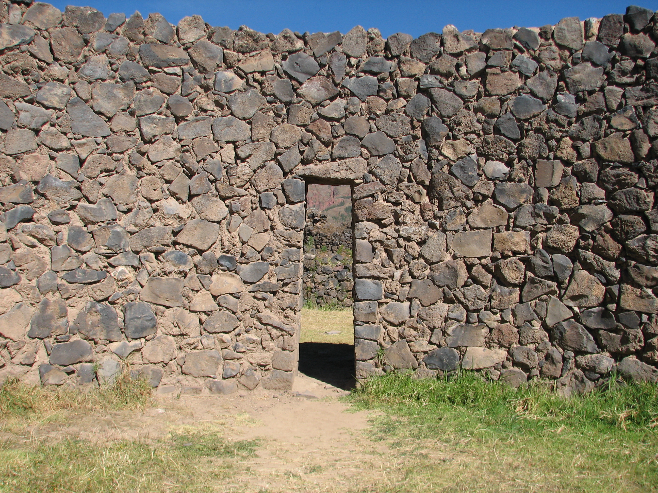 Piquillacta Archaeological site (doorway)